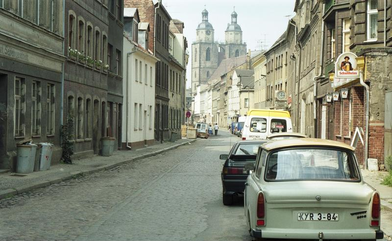 11.-18.8.1991 Bundesland Sachsen-Anhalt, Wittenberg Straßenmotive Information added by Wikimedia users.Im Straßenbild sind unter anderem Trabant 601 und ein Volkswagen Scirocco II zu sehen.